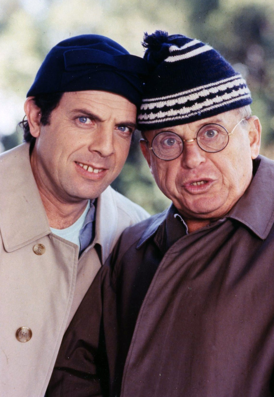 ספי ריבלין משמאל ואריק לביא מימין.